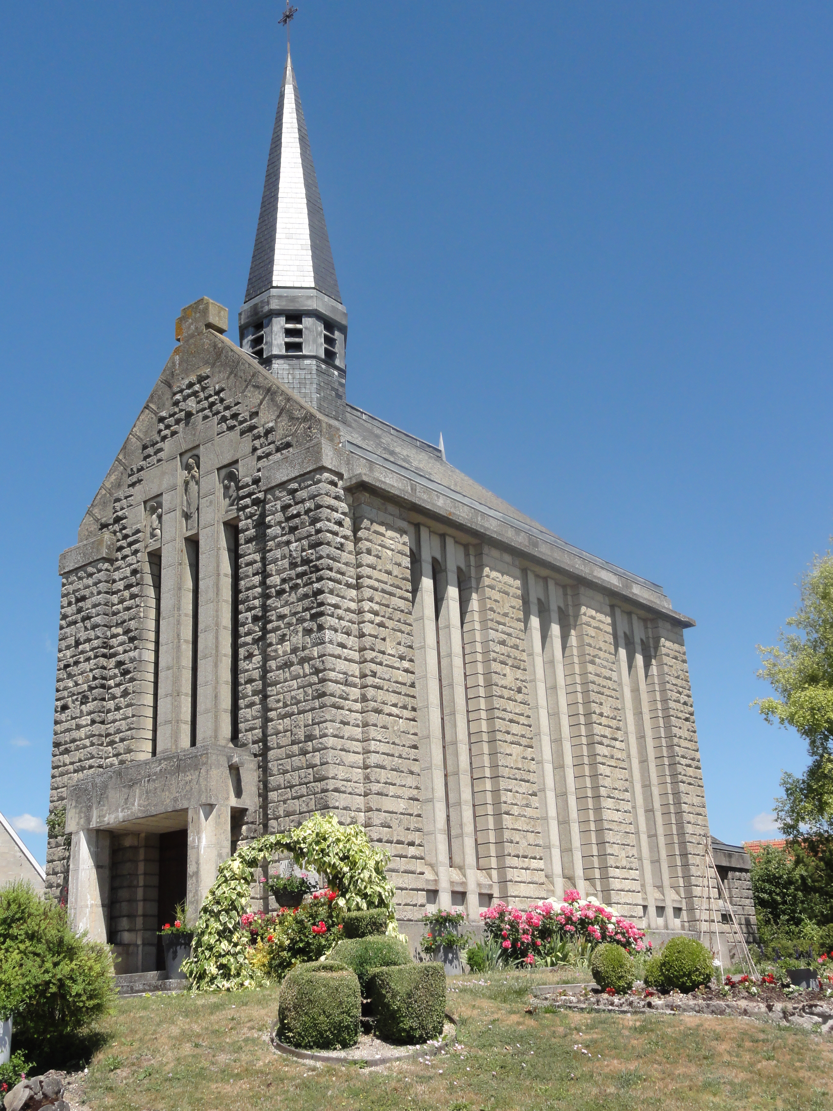 Bertricourt (Aisne) église